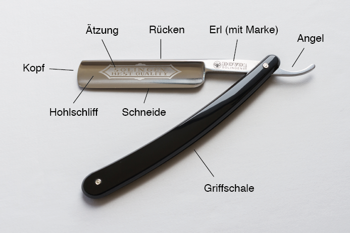 Aufbau eines Rasiermessers (mit Fachbezeichnungen)